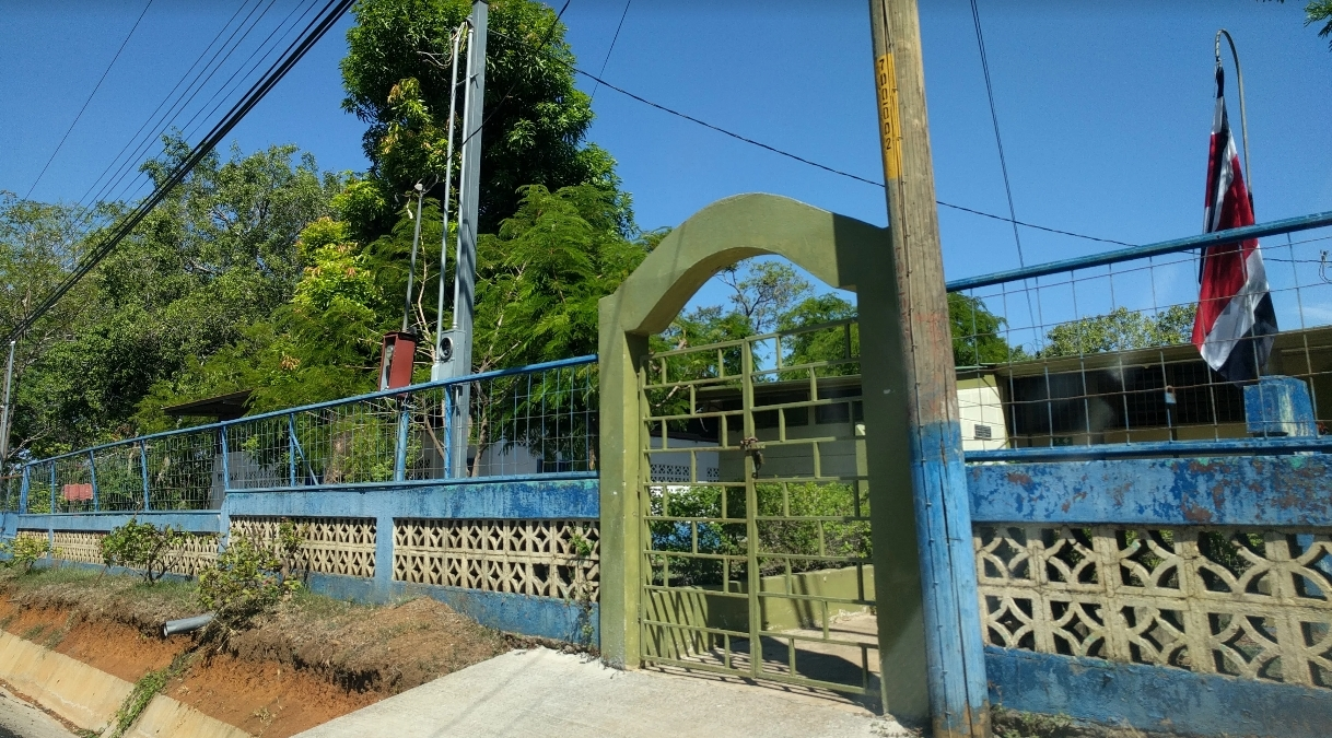 Escuela Mauro Fernández Acuña, en el distrito de San Juan de Mata, cantón de Turrubares. Costa Rica.